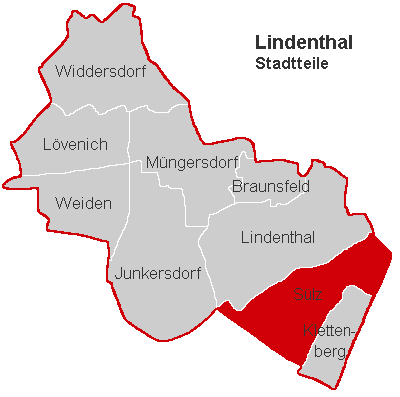 Lage des Stadtteils Sülz im Stadtbezirk Lindenthal